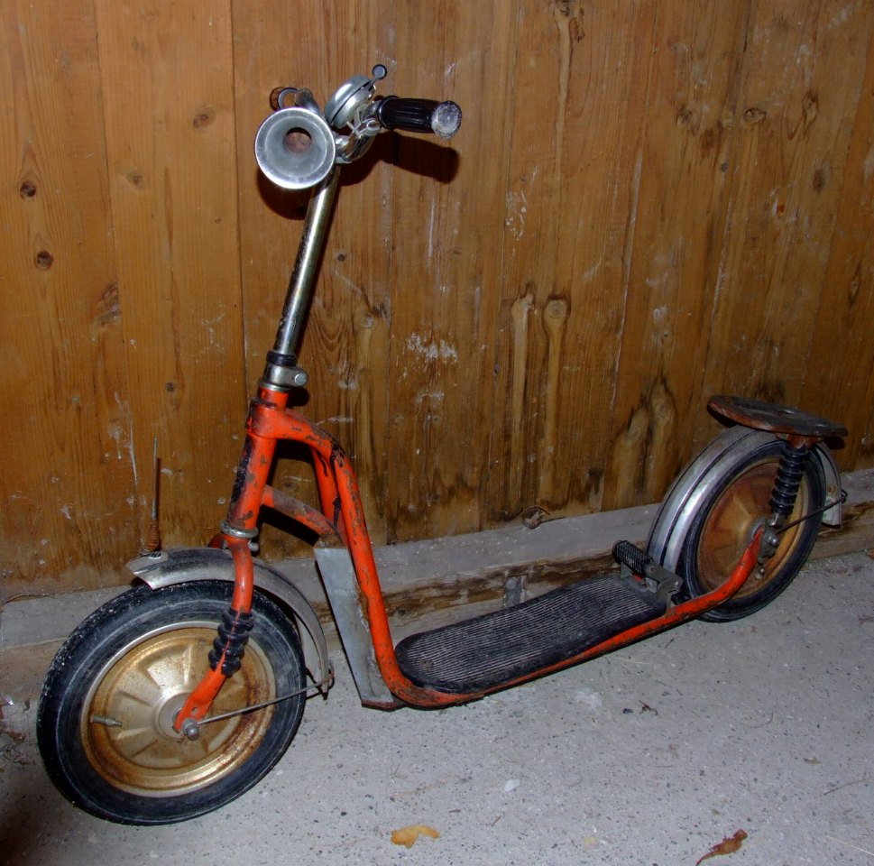 Quelle: selbst fotografiert, 07/2006 Fotograf: Späth Chr.